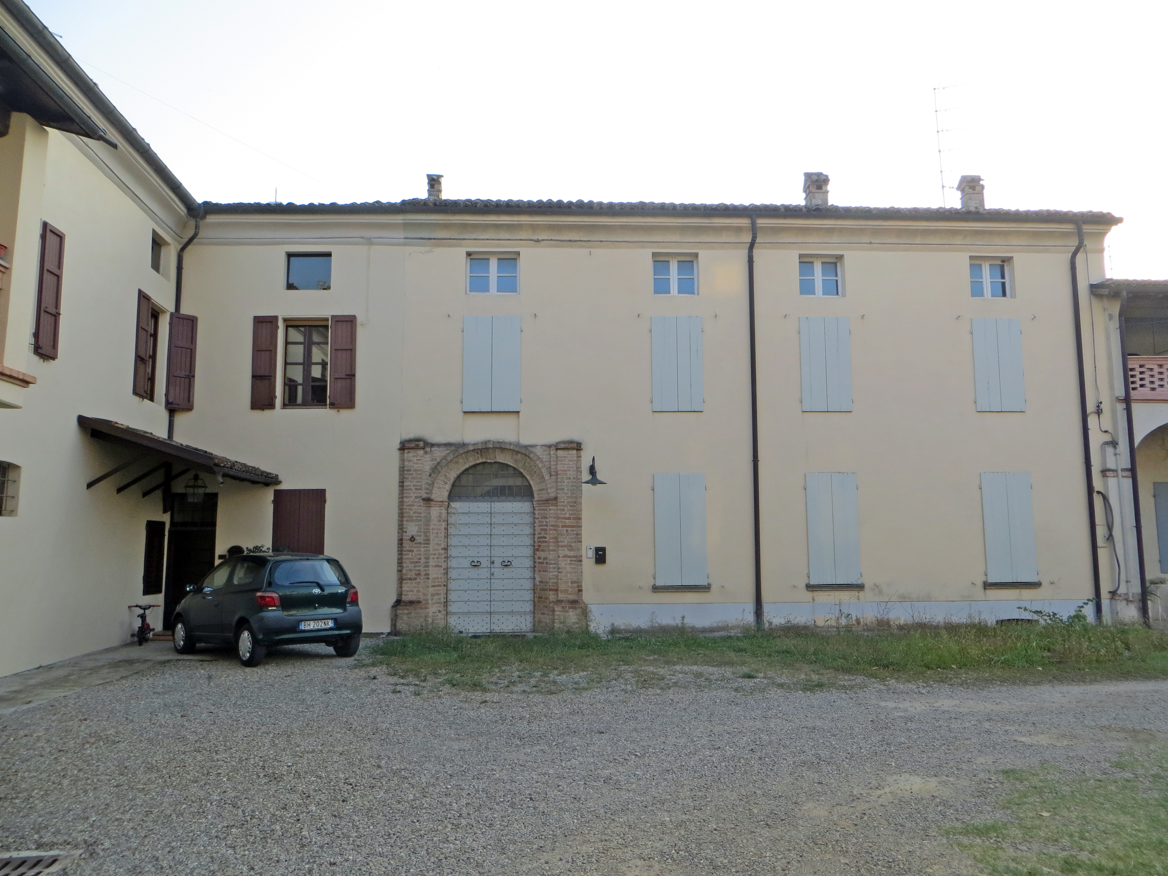 Lato sud della corte del castello di Segalara This is a photo of a monument which is part of cultural heritage of Italy.